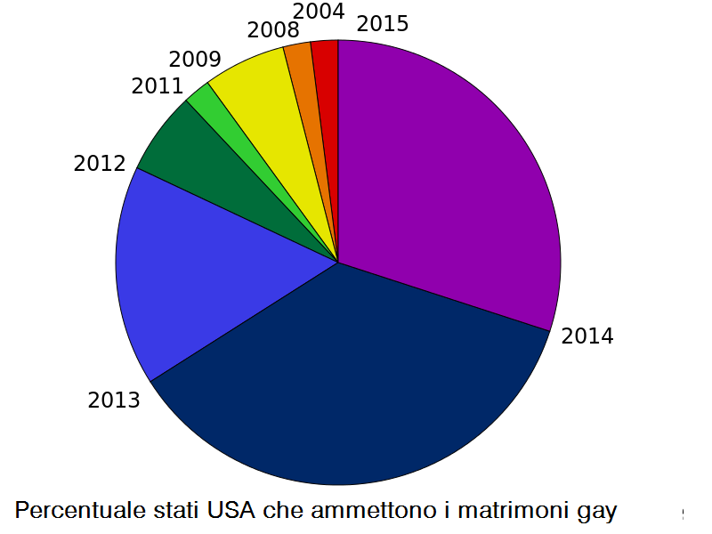 Grafico rappresentante la percentuale di stati USA dove i matrimoni gay sono legali